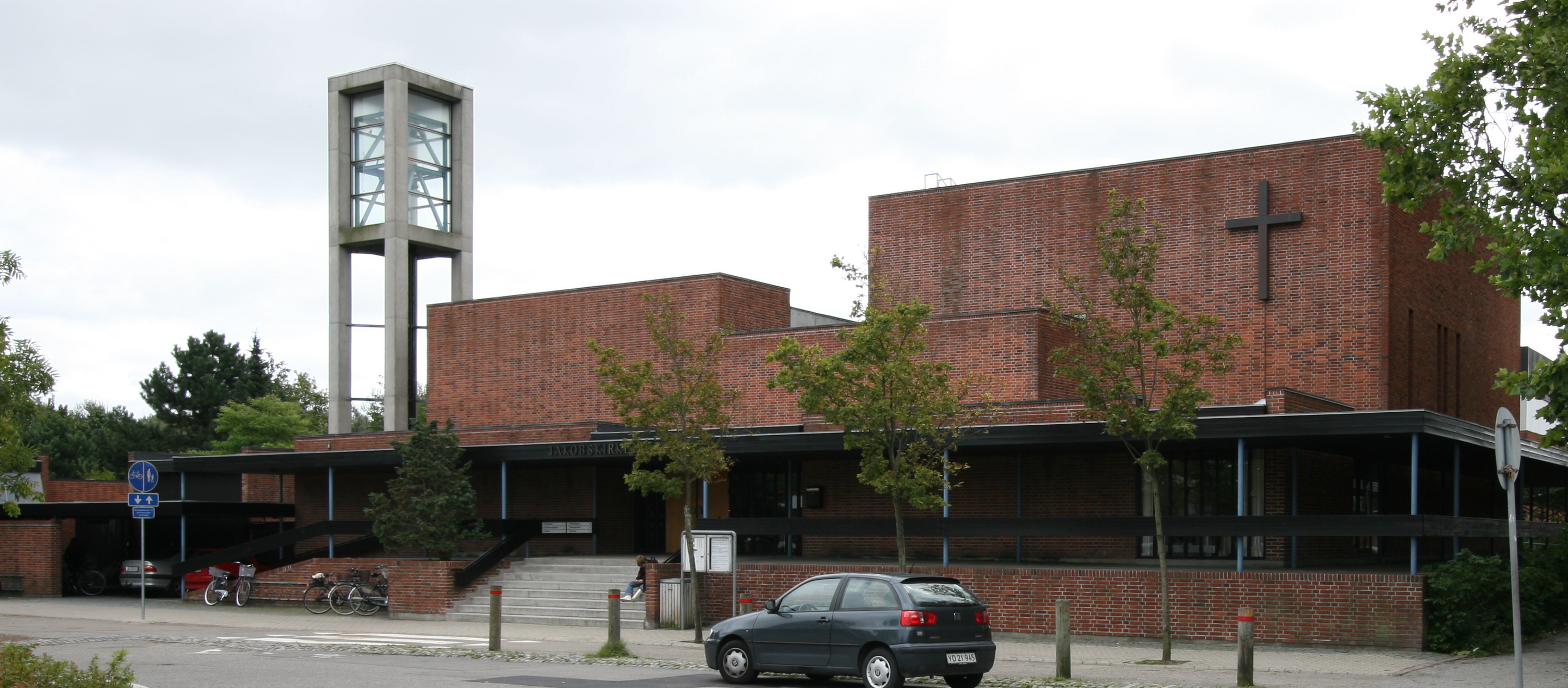 Jakobskirken in Roskilde, Denmark. Exterior.